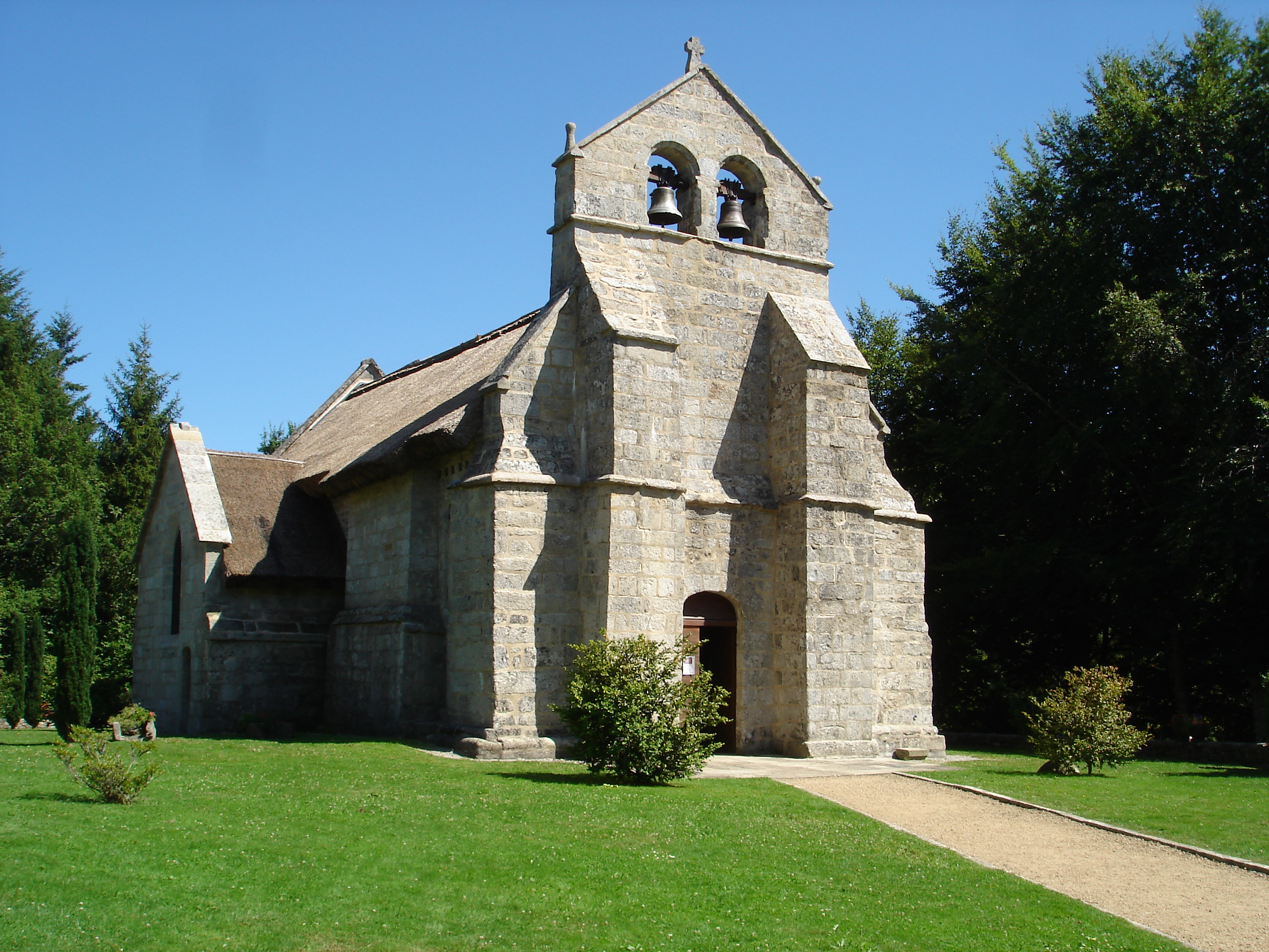 Église de Lestards, commune française, située dans le département de la Corrèze et la région Limousin (France).